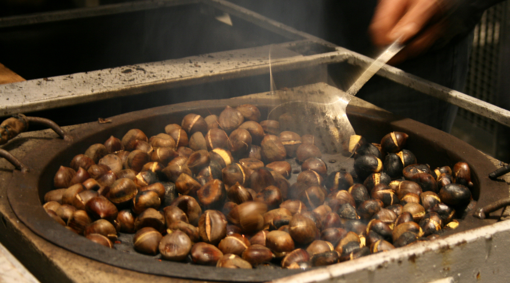 Pečeni kesteni